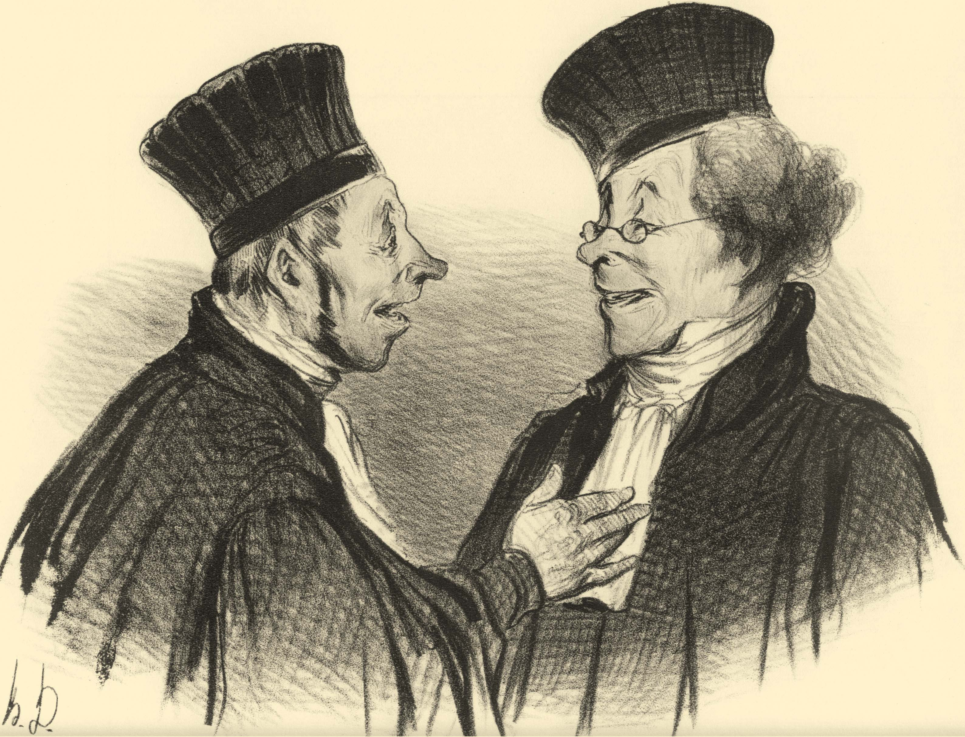 Kreidelithografie von Honoré Daumier. Erschienen im Le Charivari Nr. 20, 1838